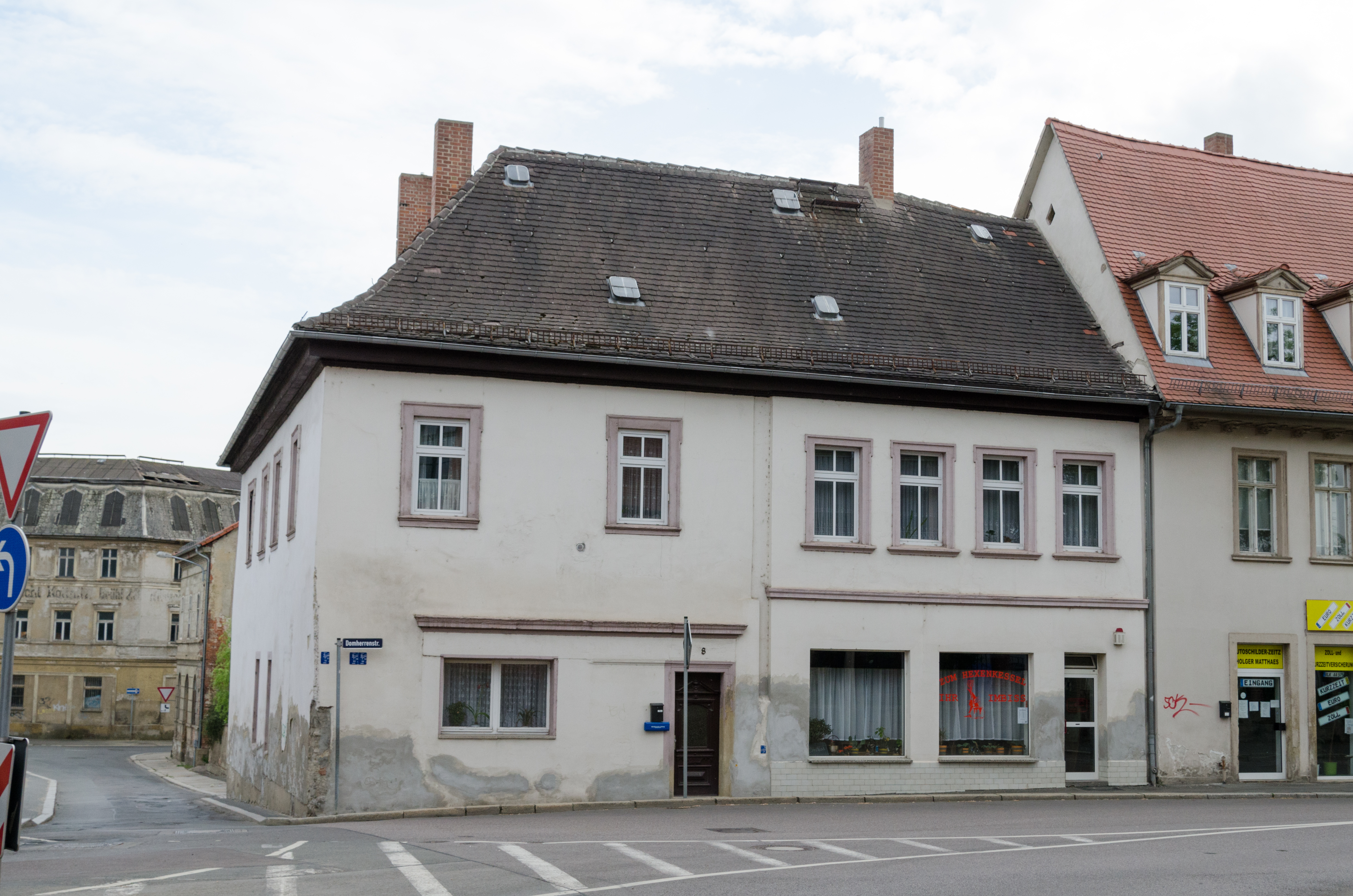 Zeitz, Domherrenstraße 8